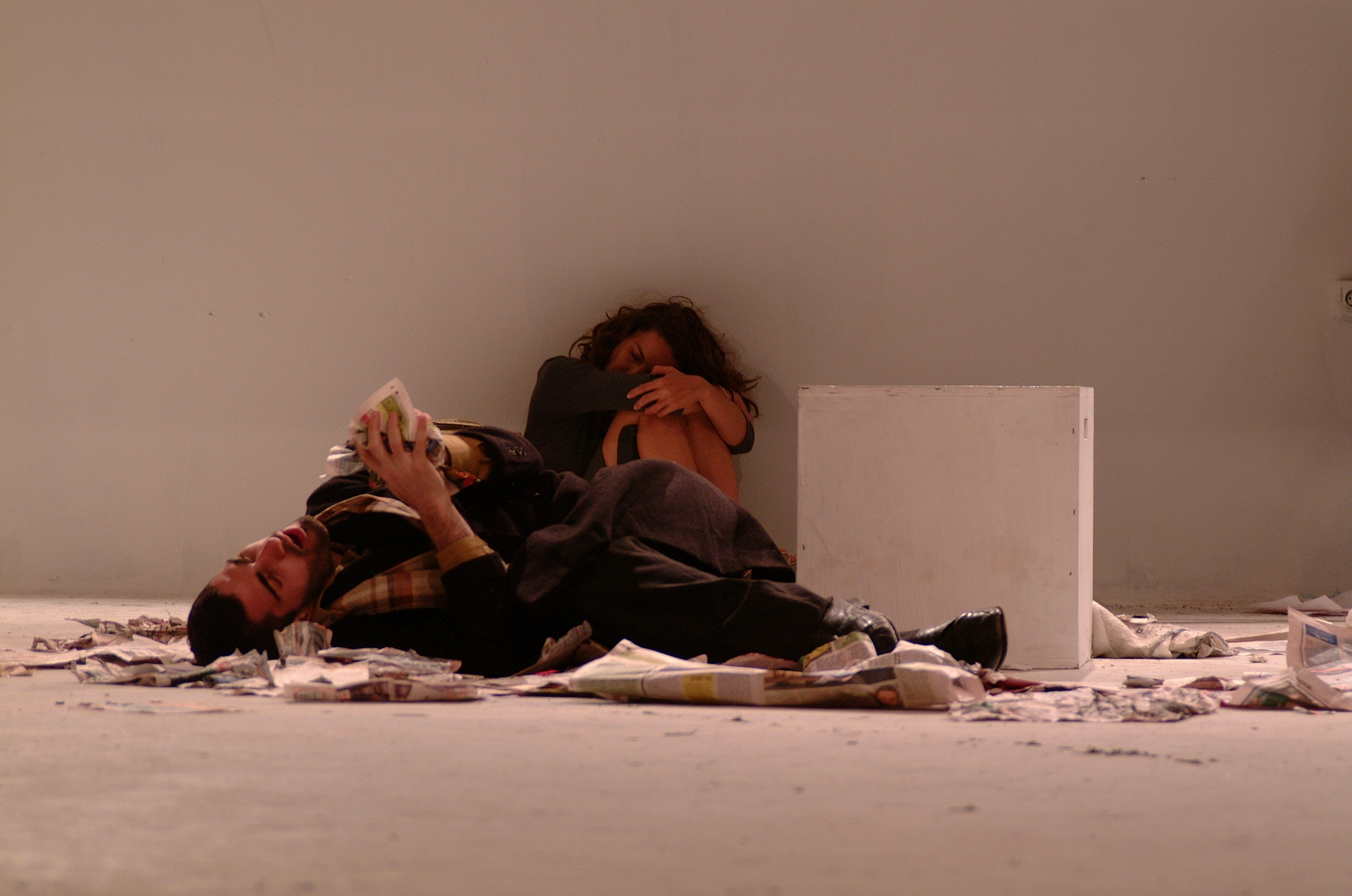 פרפטואום מובילה מאת ובבימויו של עודד ליפשיץ